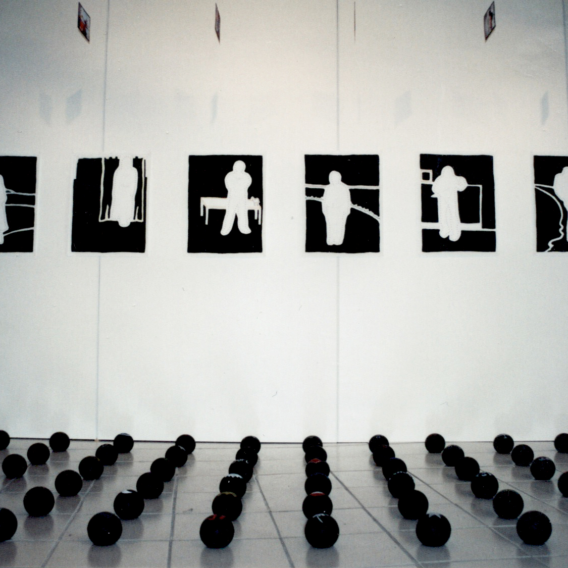 Dans un espace désaffecté de la Plaza 3 située au centre ville d'Alma (Québec, Canada), 5 jeunes artistes du Lac-Saint-Jean exposent leurs oeuvres (Geneviève Boucher, Bianka Robitaille, Jean-Denis Simard, Daniel Fortin, Pascal Bouchard). C'est la même exposition qu'ils ont tenu au Centre d'artistes Le Lieu à Québec. Cette galerie TEMPORAIRE pour artistes sans LIEUX DE TRAVAIL a été fermée à la fin de cette exposition en 2002.